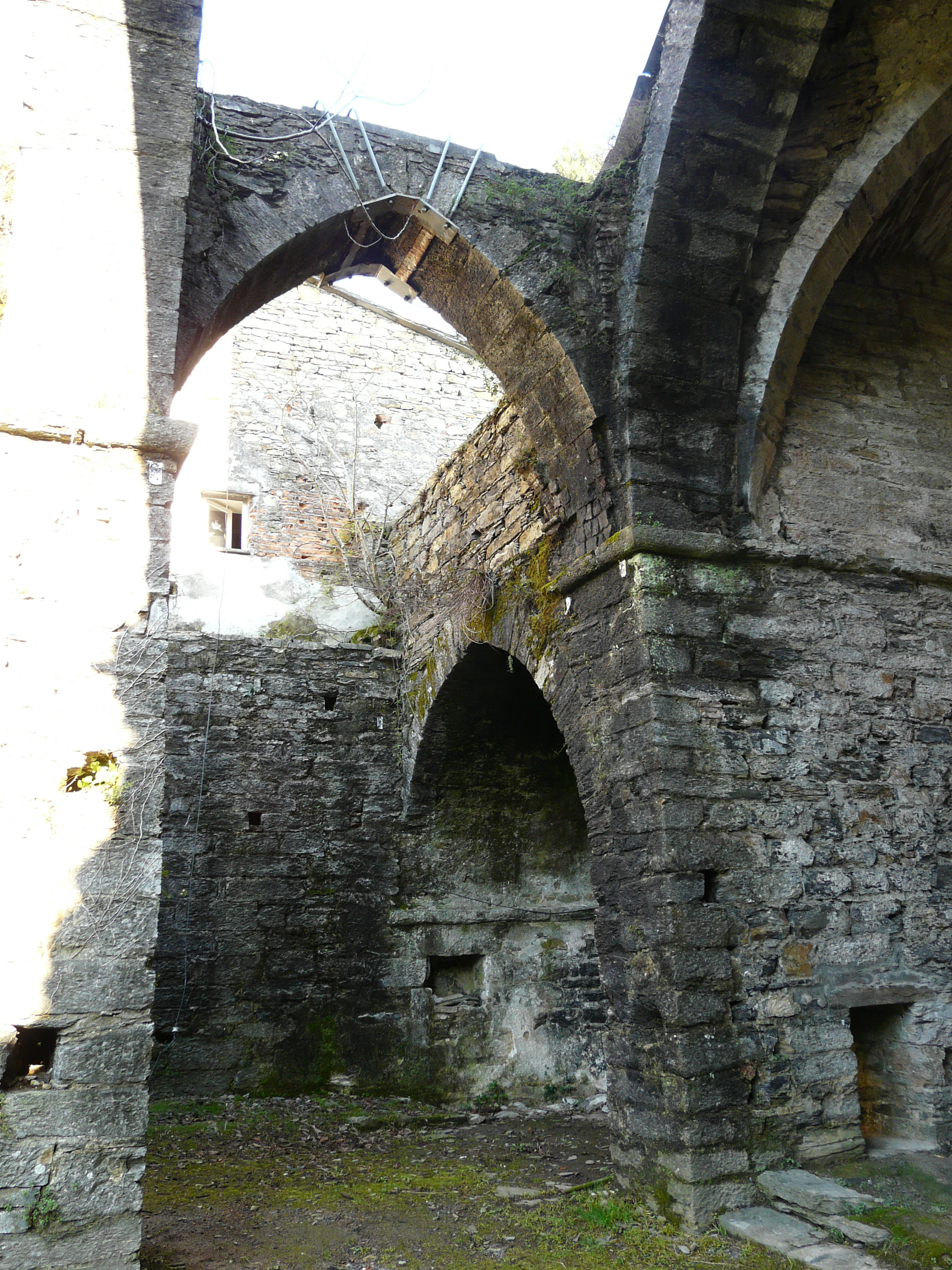 Ruderi dell'antico complesso monastico di Valle Christi del XIII secolo presso Rapallo, Liguria, Italia